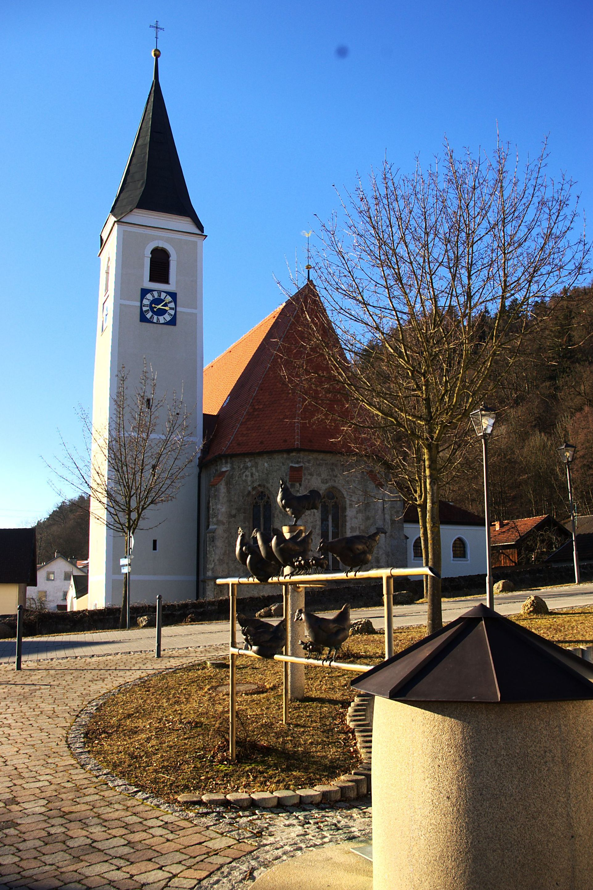 Ortskern von Julbach mit Pfarrkirche